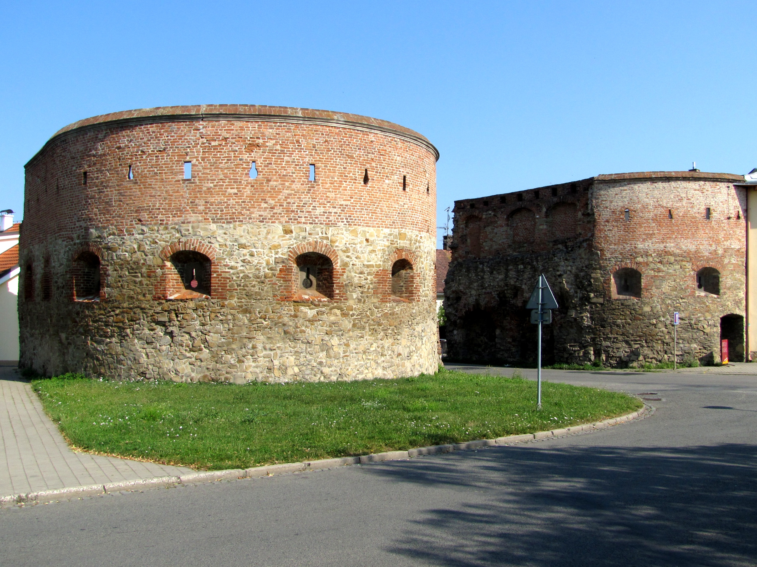 Veselská brána - pozůstatek městského opevnění z 16. století